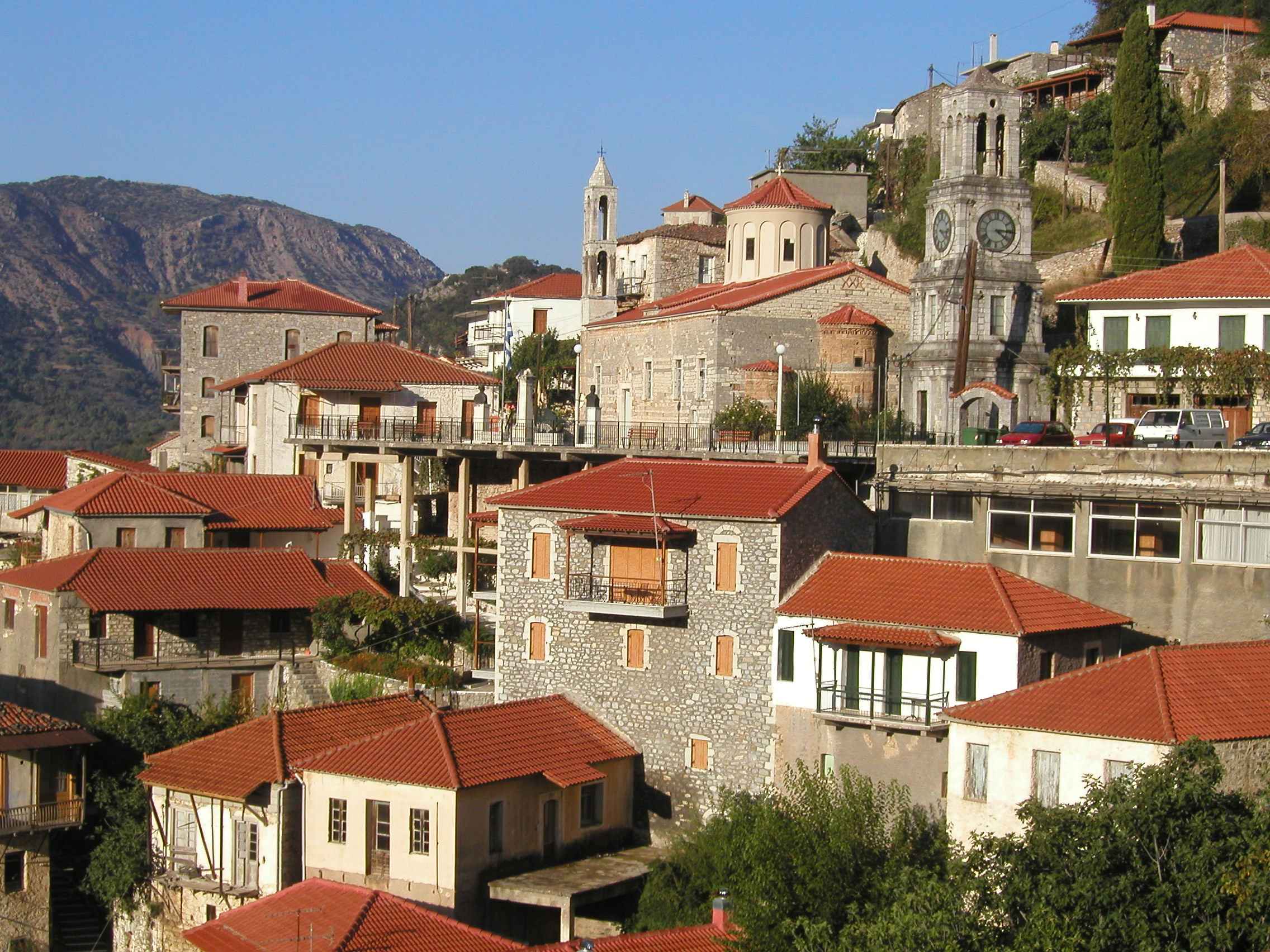 Langadia